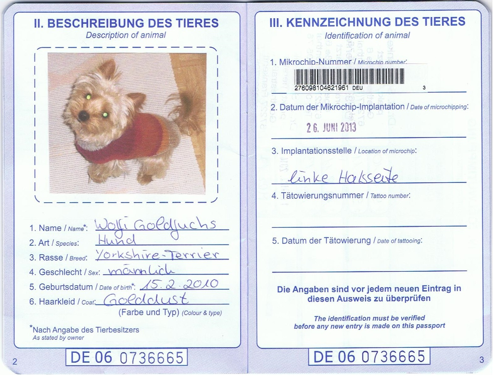 Daten zur Identifizierung des Hundes